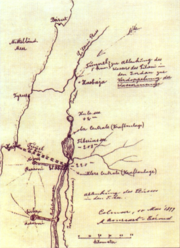 תעלת הימים המסלול של בורקארט 1899